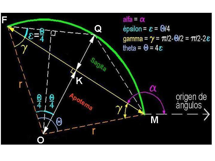 Apotema